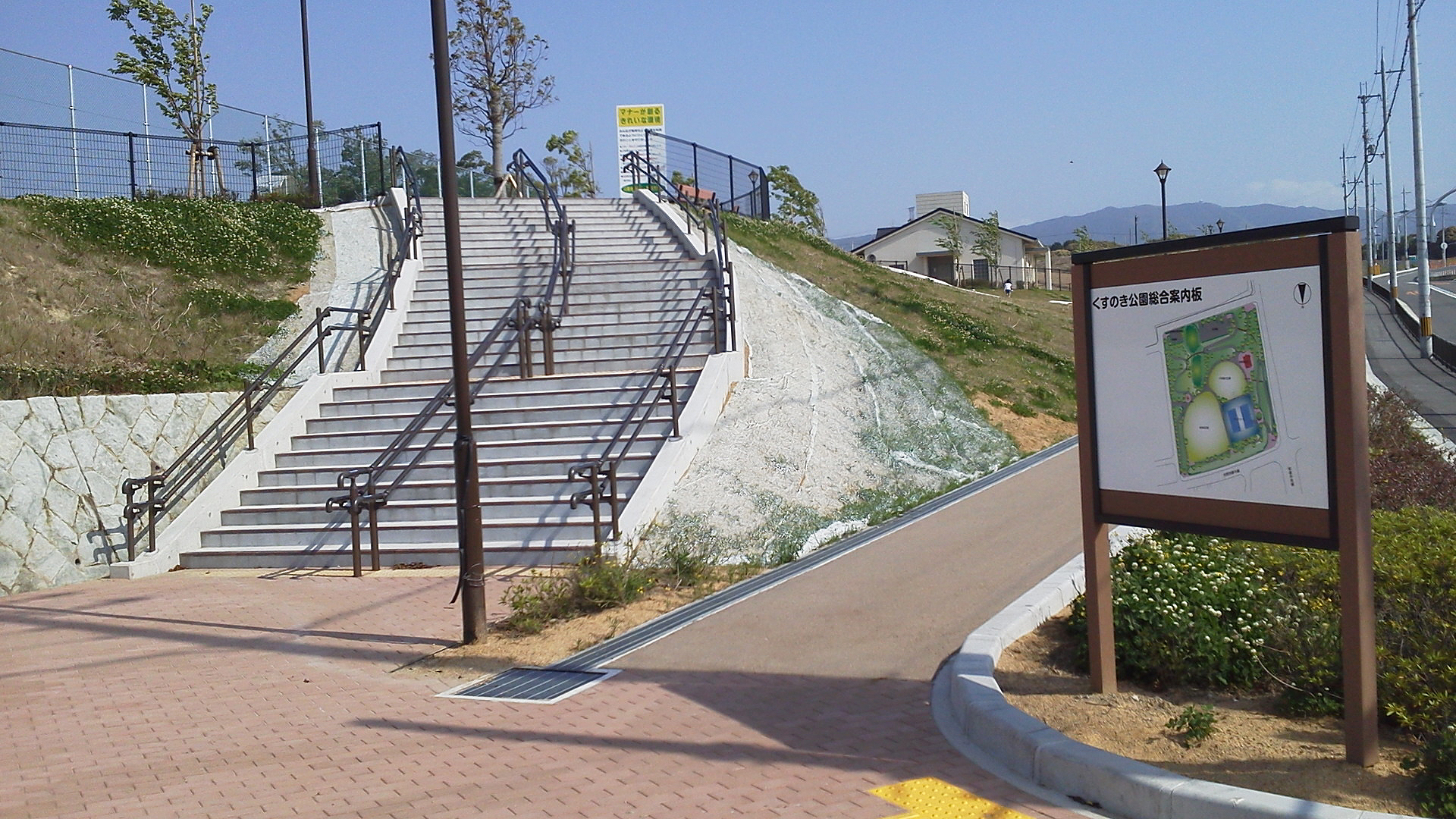 投稿者自身が大阪府和泉市内の児童公園のひとつである『くすのき公園』を撮影。 （正面入口）